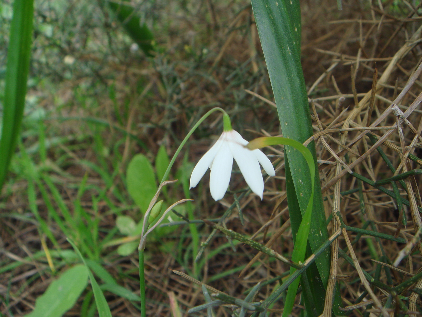 Campanilla de verano Leucojum trichophyllum Schousb. Pinar de la Barrosa, Chiclana (Cádiz), España